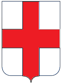 Stemma di Canposanpiero, Italia.